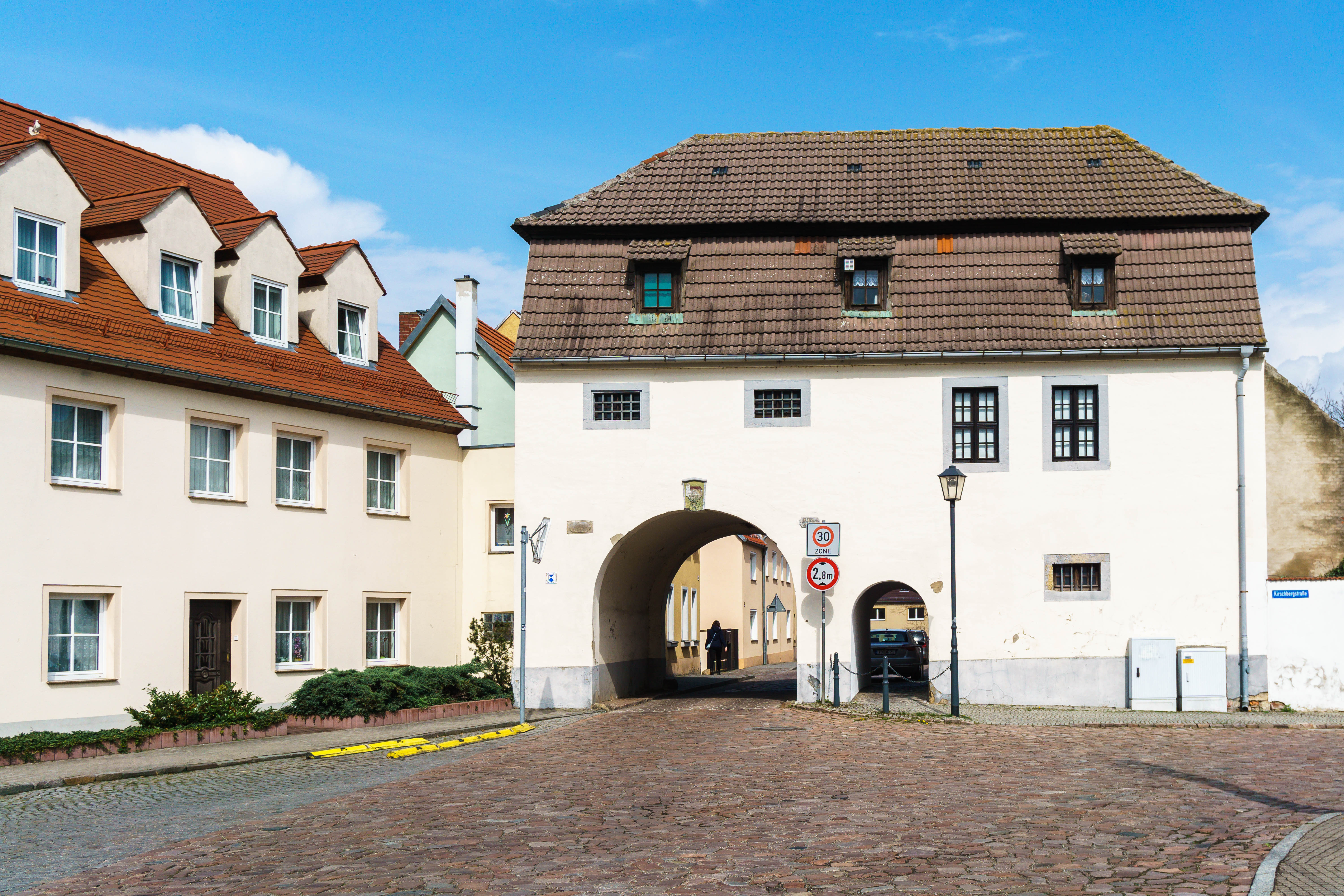 Oschatzer Tor, Bestandteil der frühmittelalterlichen Befestigungsanlage, Oschatzer Straße 11 in Belgern-Schildau OT Belgern.